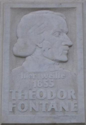 Gedenkplakette für Theodor Fontane im Stadtzentrum von Luckenwalde, Brandenburg.